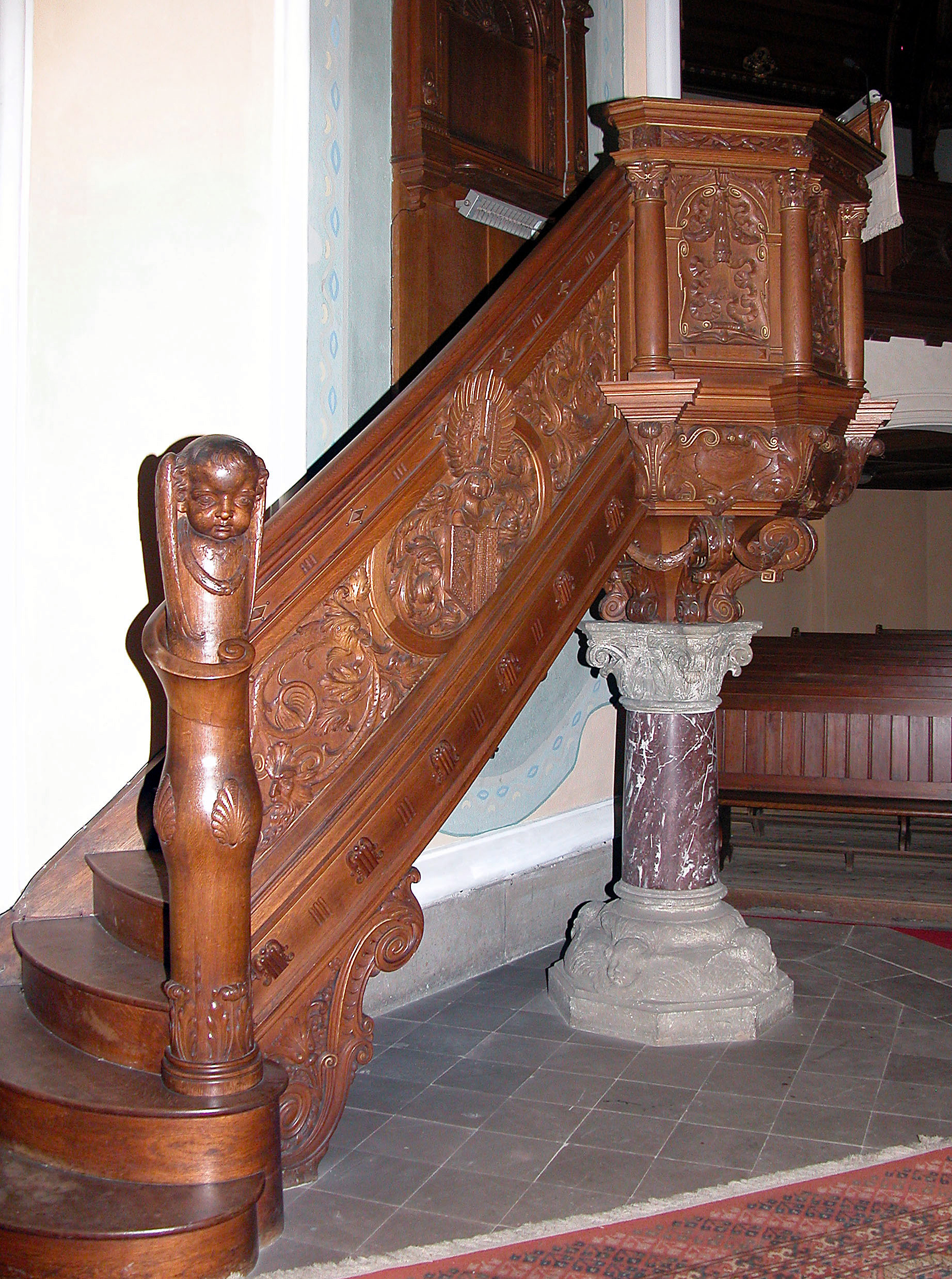 31.03.2005 01187 Dresden-Altplauen, Reckestraße 6 (GMP: 51.028935,13.704658): Ev.-Luth. Auferstehungskirche. 700jährige Vorgeschichte mit vielen Umbauten. Früher hieß sie Michaeliskirche. Nach dem letzten großen Erweiterungsbau erhielt sie 1903 den Namen Auferstehungskirche. Architekten waren William Lossow und Hermann Viehweger. Neorenaissance mit Jugendstilelementen. Schnitzkanzel. [DSCN6166.TIF]20050331094DR.JPG(c)Blobelt